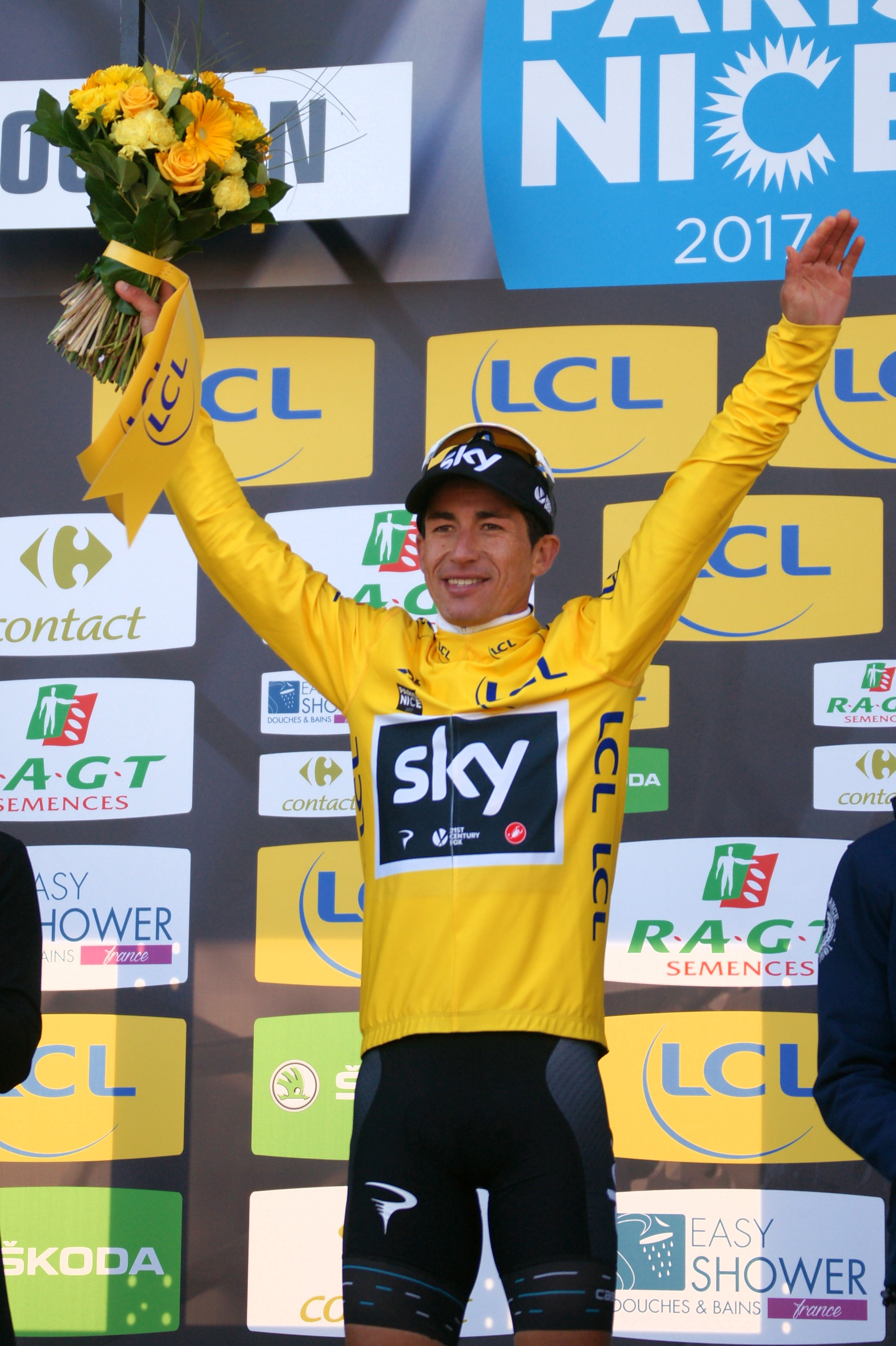 Sergio Henao maillot jaune Roubion Paris-Nice 2017